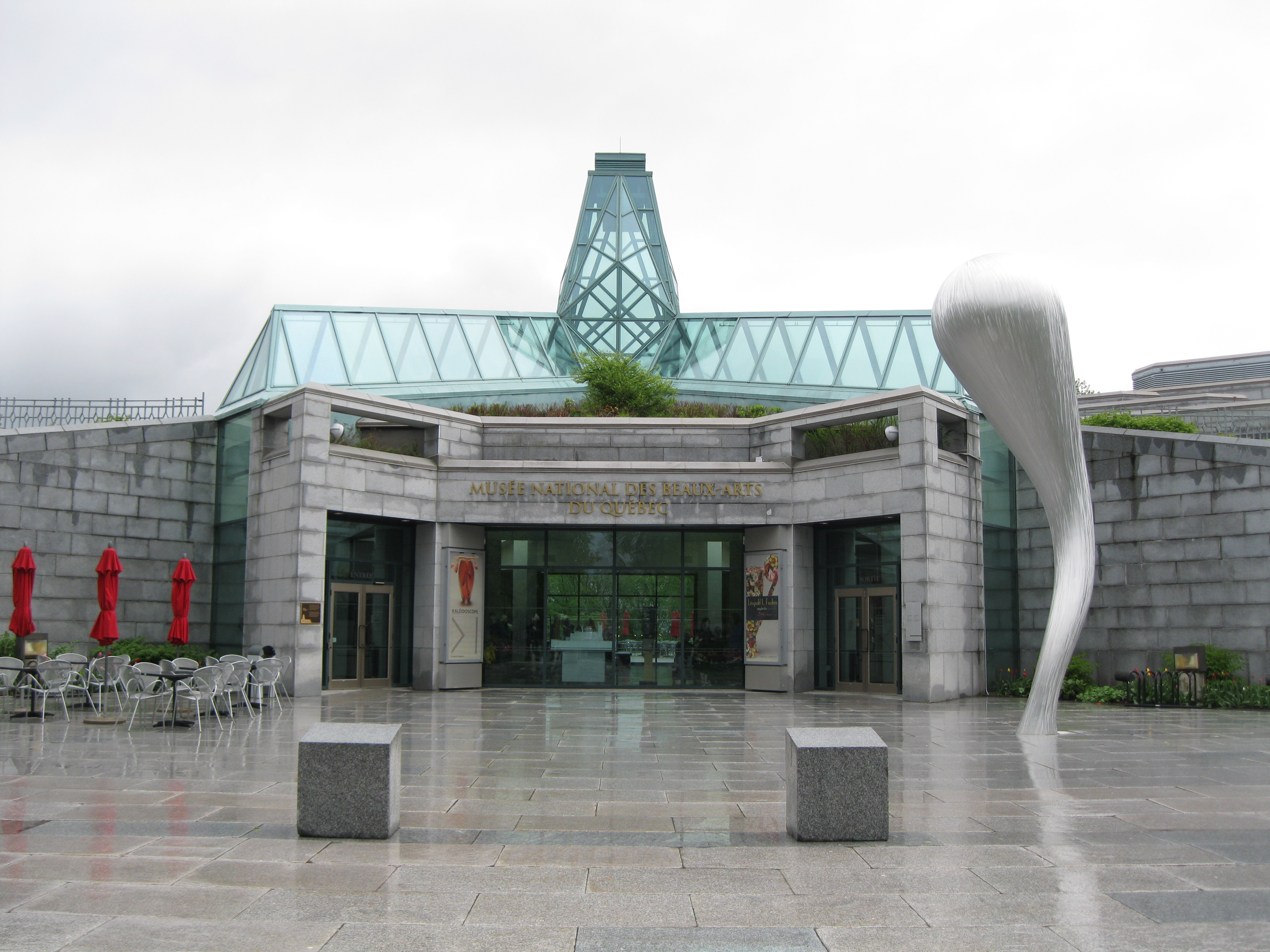 Pavillon central du Musée national des beaux-arts du Québec